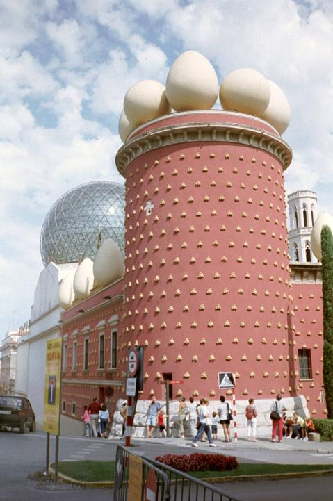 Entrée du musée Salvador Dali à Figueres (Es.)